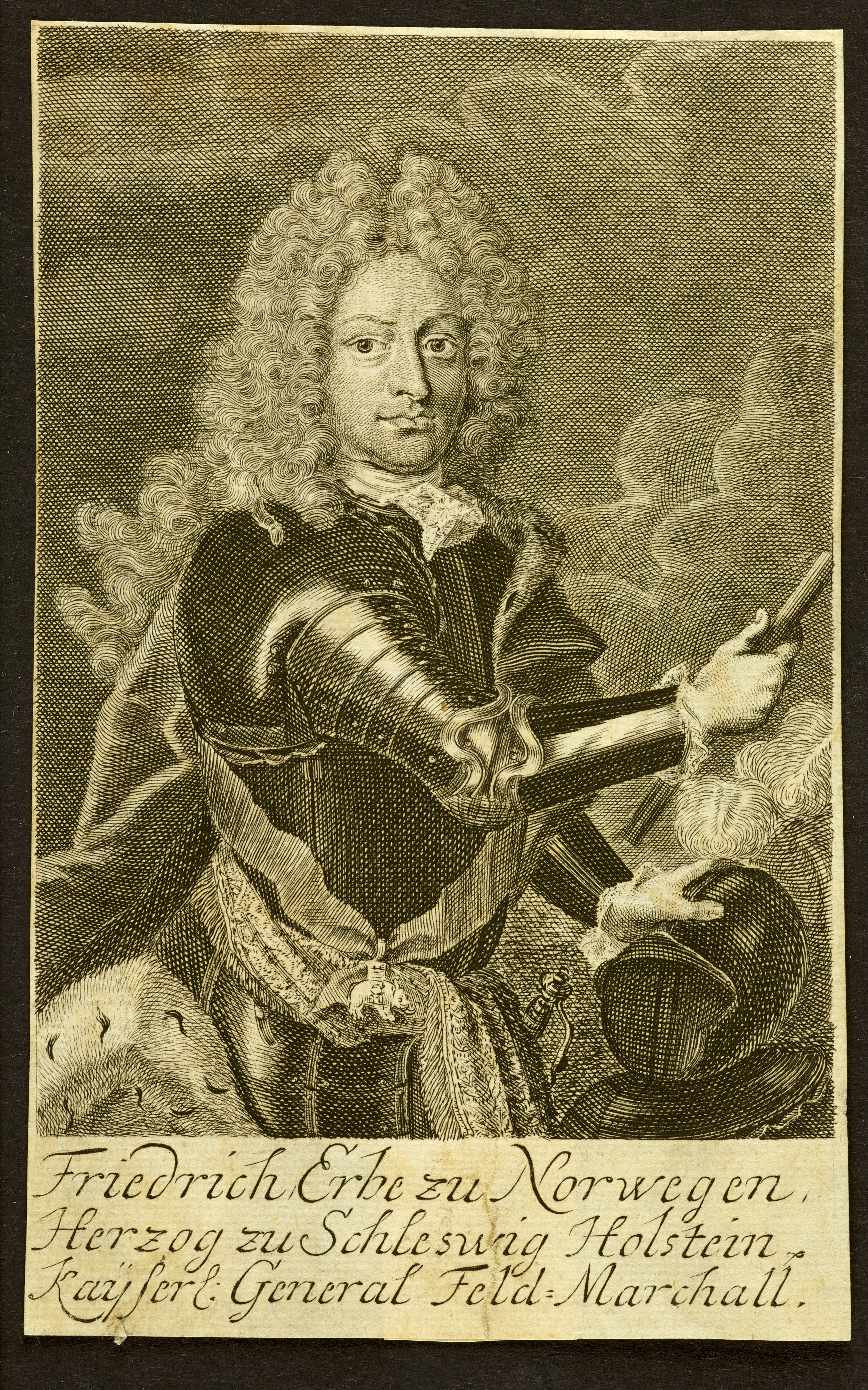 Kobberstik af Frederik (1651-1724), hertug af Slesvig-Holsten-Sønderborg-Wisenburg, Billedsamlingen. Müllers Pinakotek 8, 6, I c, 8°